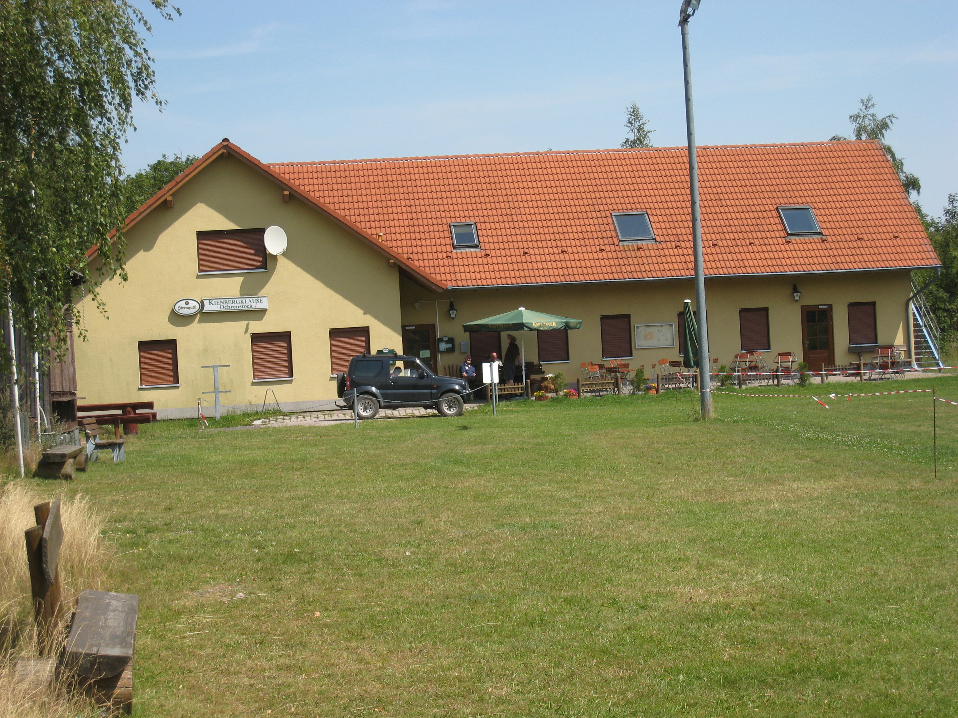 Ausfluggasthof Kienbergklause in Oehrenstock, Langewiesen.